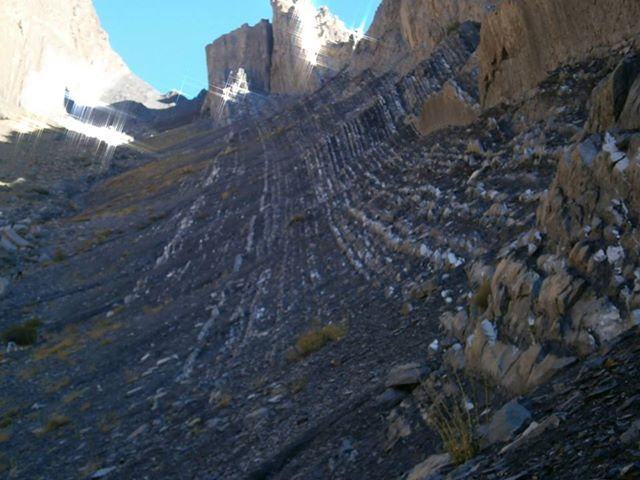 Estratos de la zona de Lo Valdés en el Cajón del Maipo, cerca de Santiago de Chile. Estos estratos estàn con fòsiles marinos a una altura de 2100 msnm.